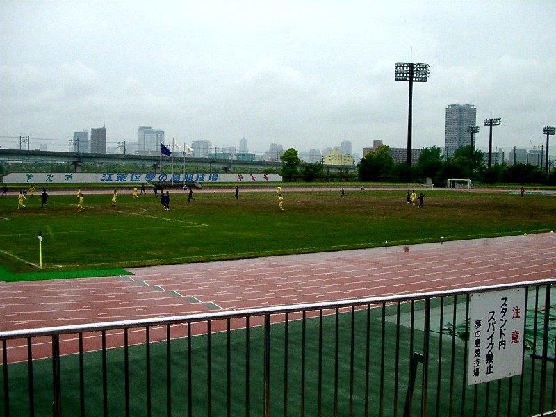 場内スタンドよりピッチ上を望む